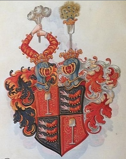 Wappen der Herren, Freiherren von Stadl aus der Kornberger Linie (Von Stadel zu Kornberg, von und zu Stadel-Kornberg) aus dem 16. Jahrhundert.